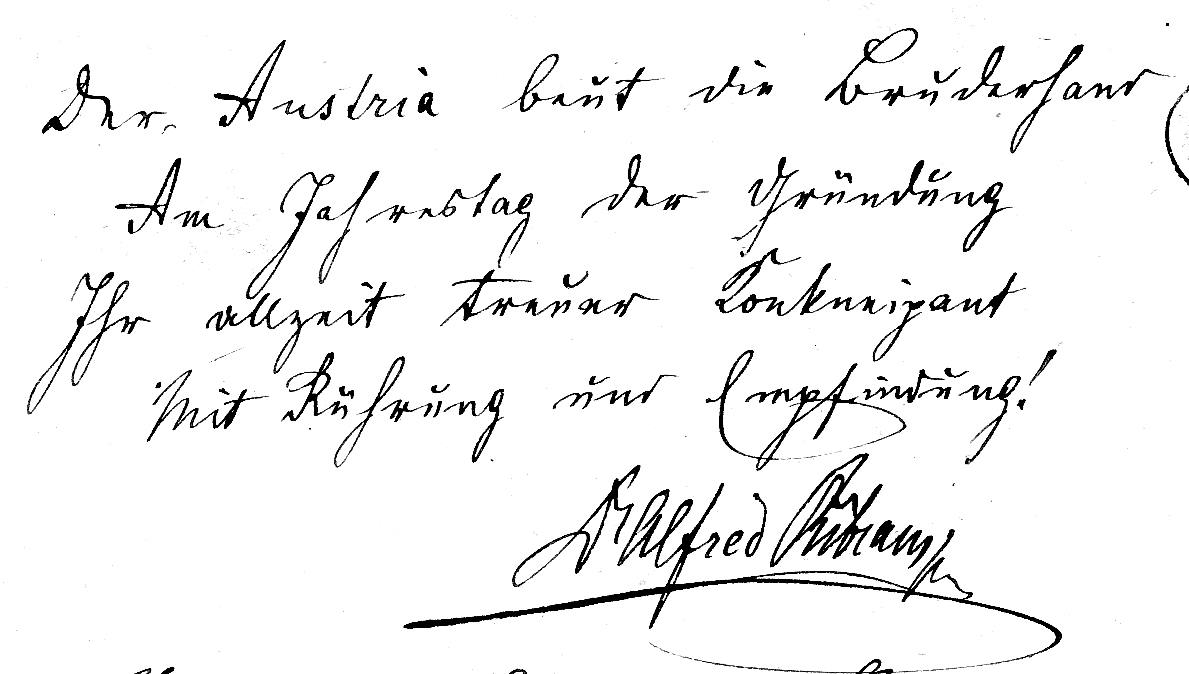 Eintrag von Pribram in das Gästebuch des Corps Austria in Prag am 23. Februar 1862